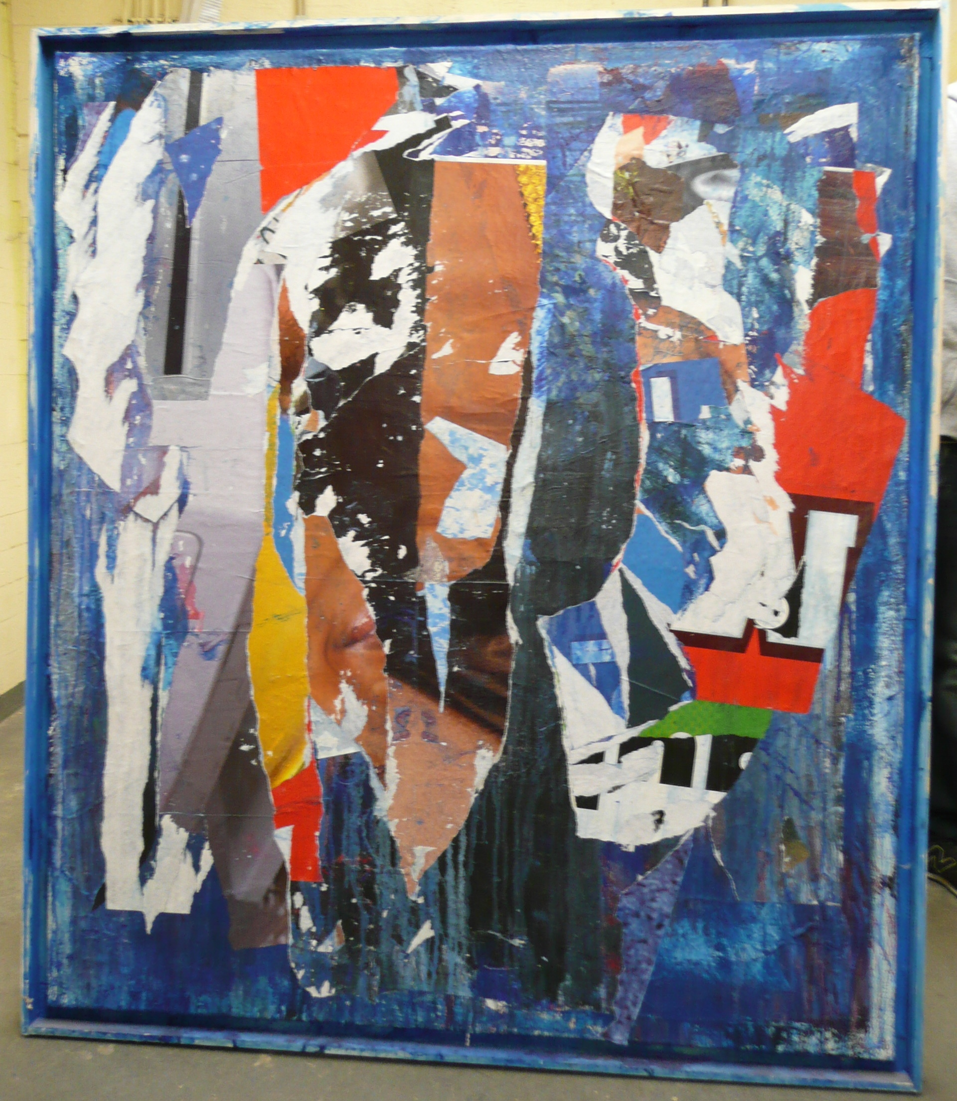 Wandbild von Burkhardt Rokahr